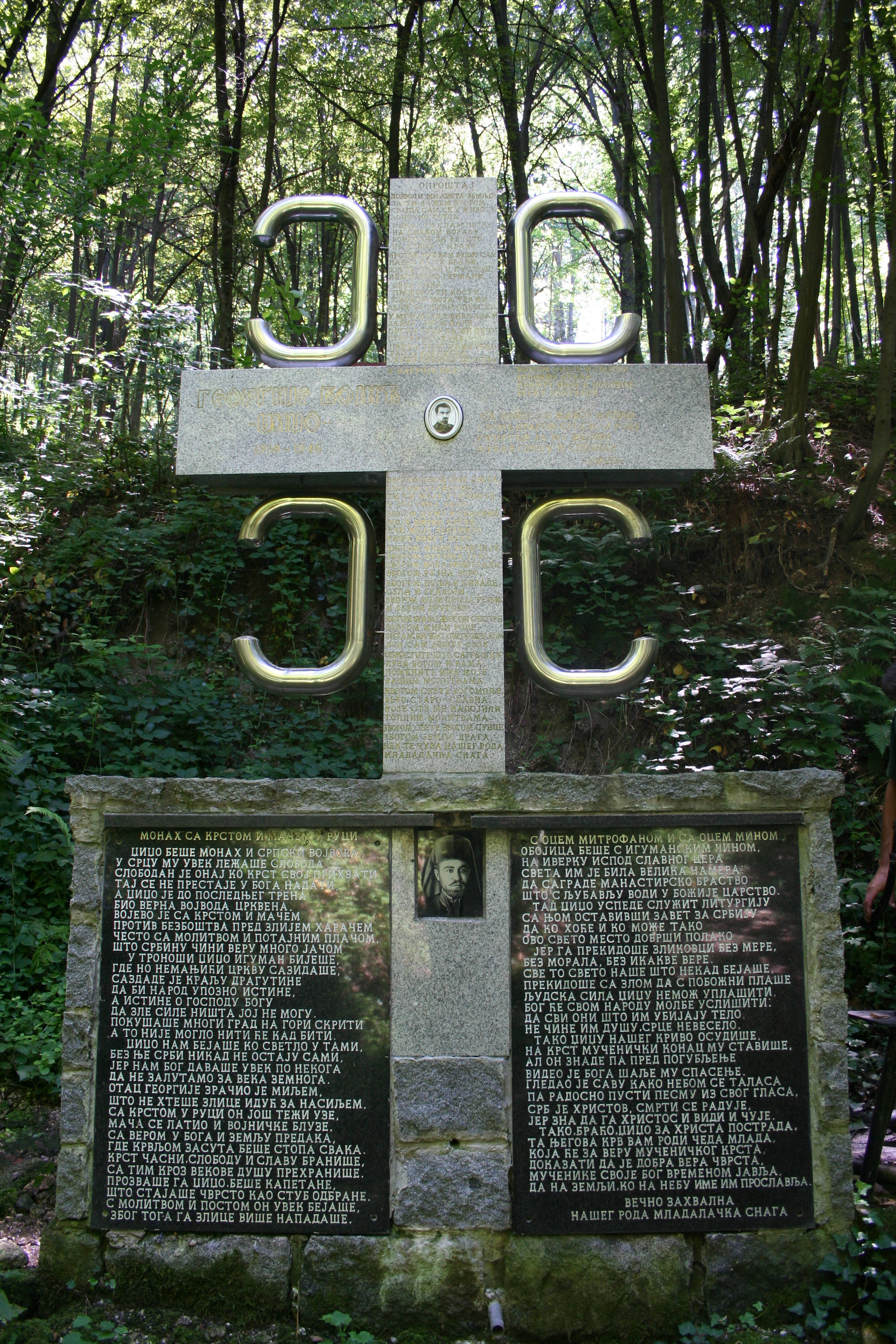 Ruševine manastira i spomenik na izvoru na Iverku, Jarebice